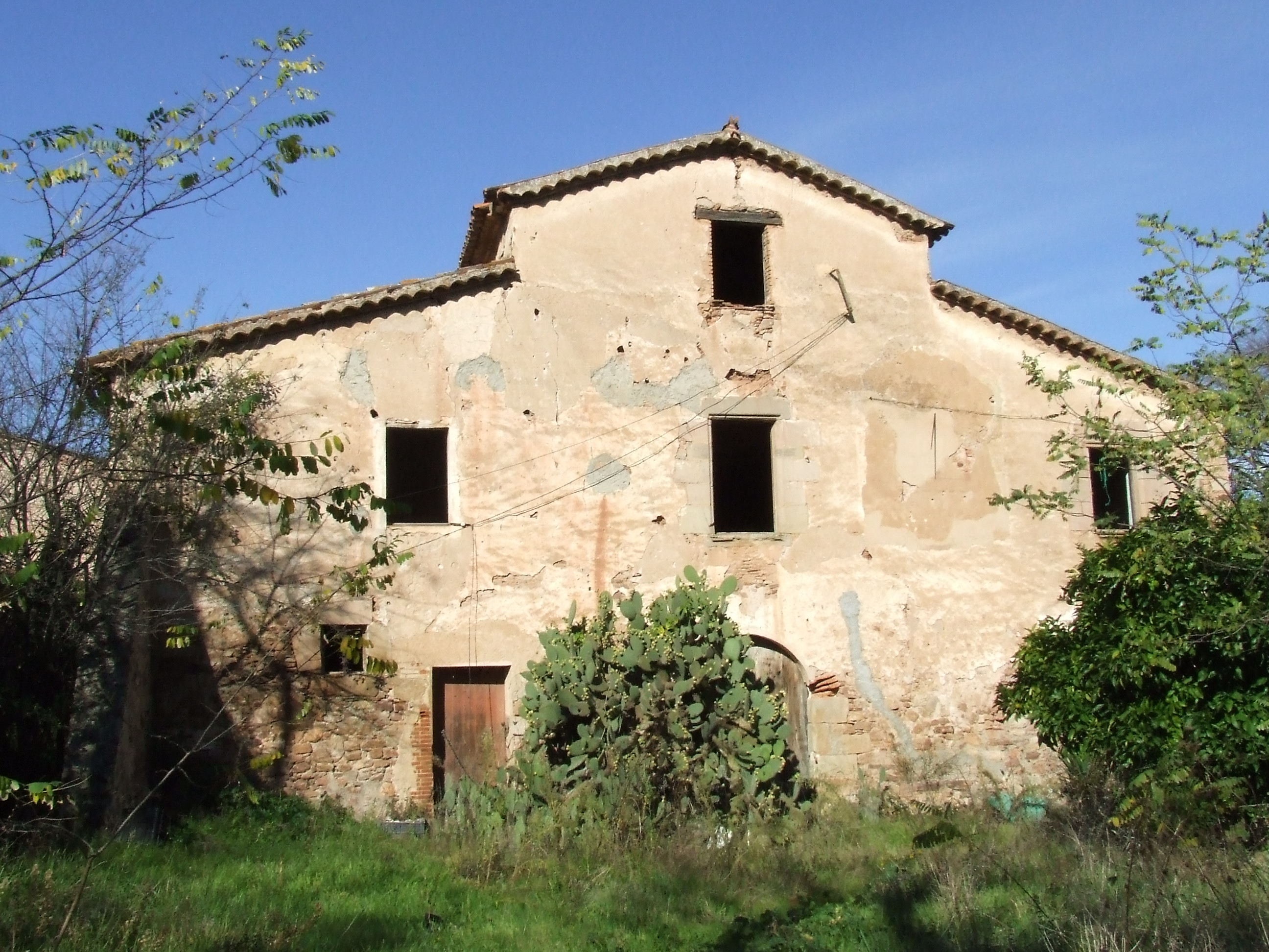 Can Granada (Bigues, Bigues i Riells, Vallès Oriental)